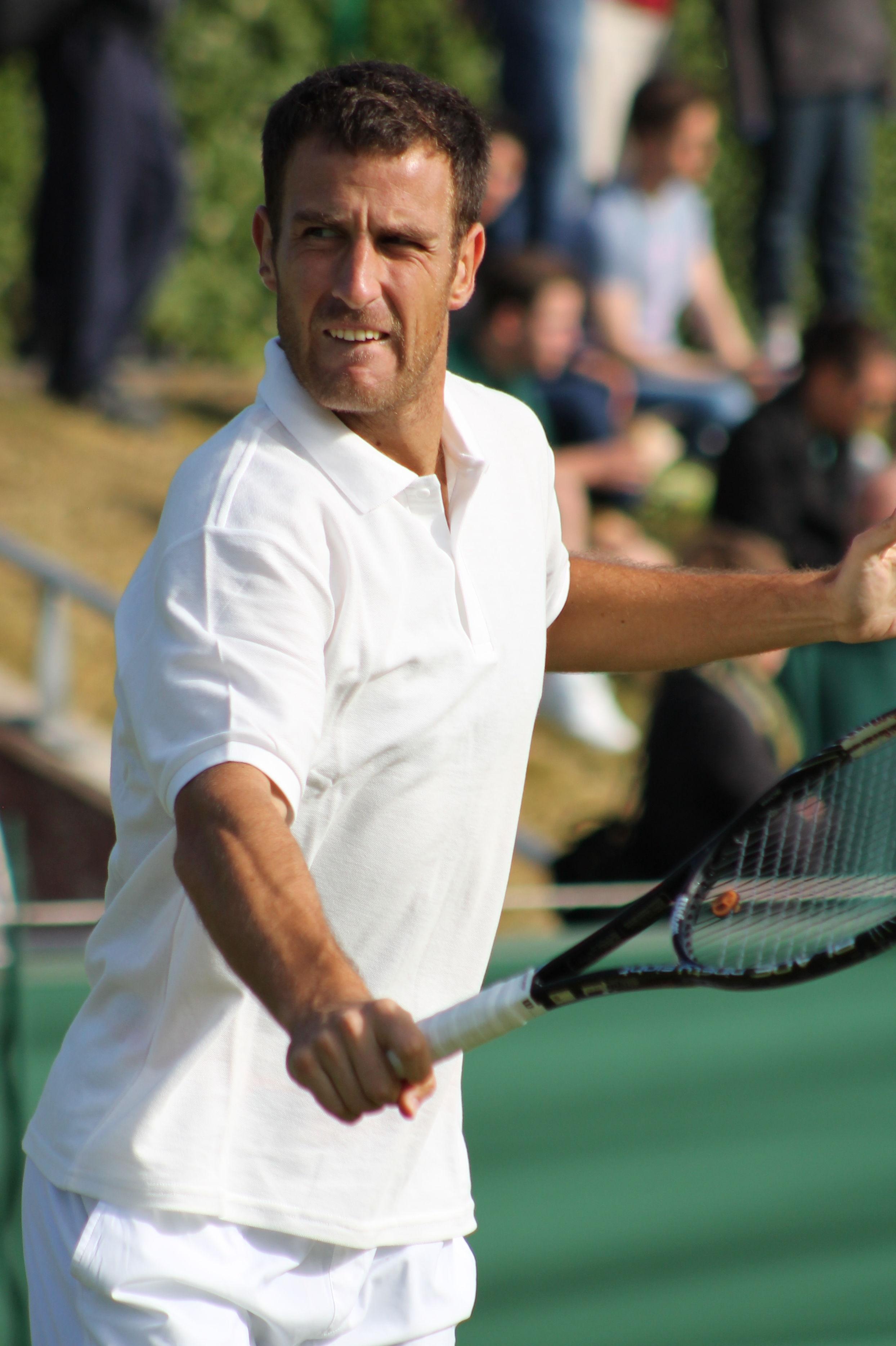 Setkic WMQ15 (9)